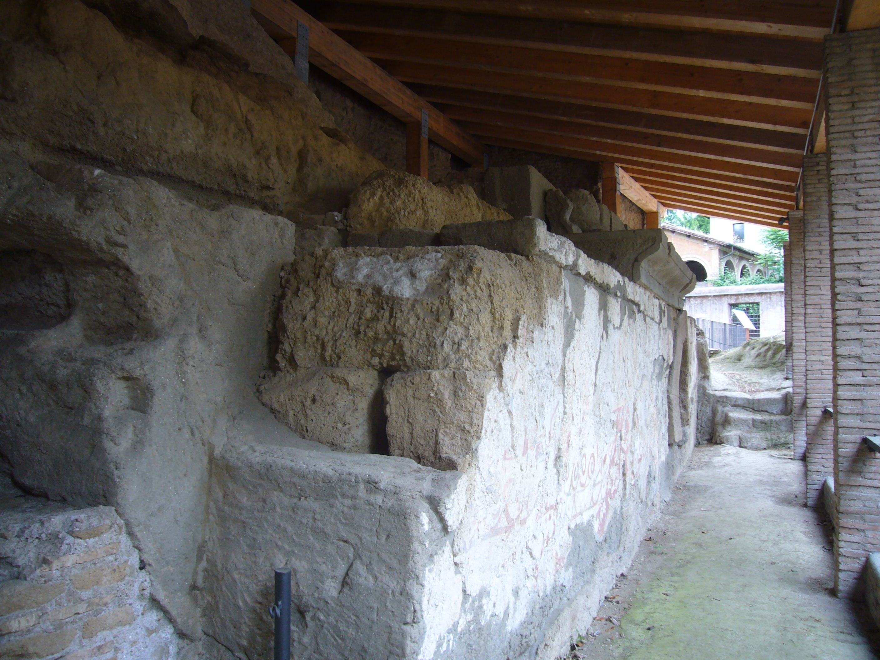 Roma, sepolcro degli Scipioni, see filename